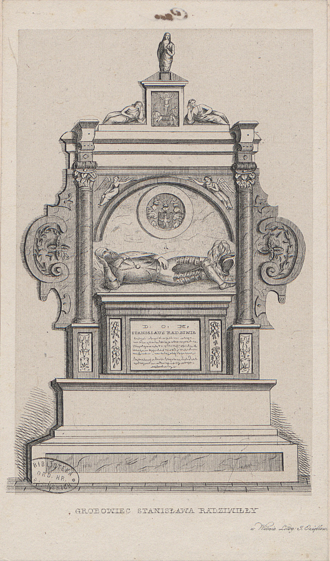 Беларуская (тарашкевіца): Надмагільле Станіслава Радзівіла Пабожнага (Stanisłaŭ Radzivił Pabožny)